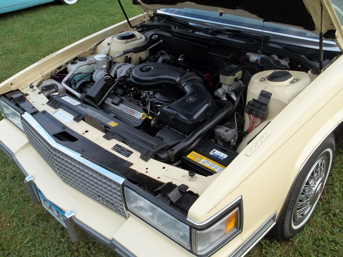 As seen at Monday nights cruise night in Granby, CT